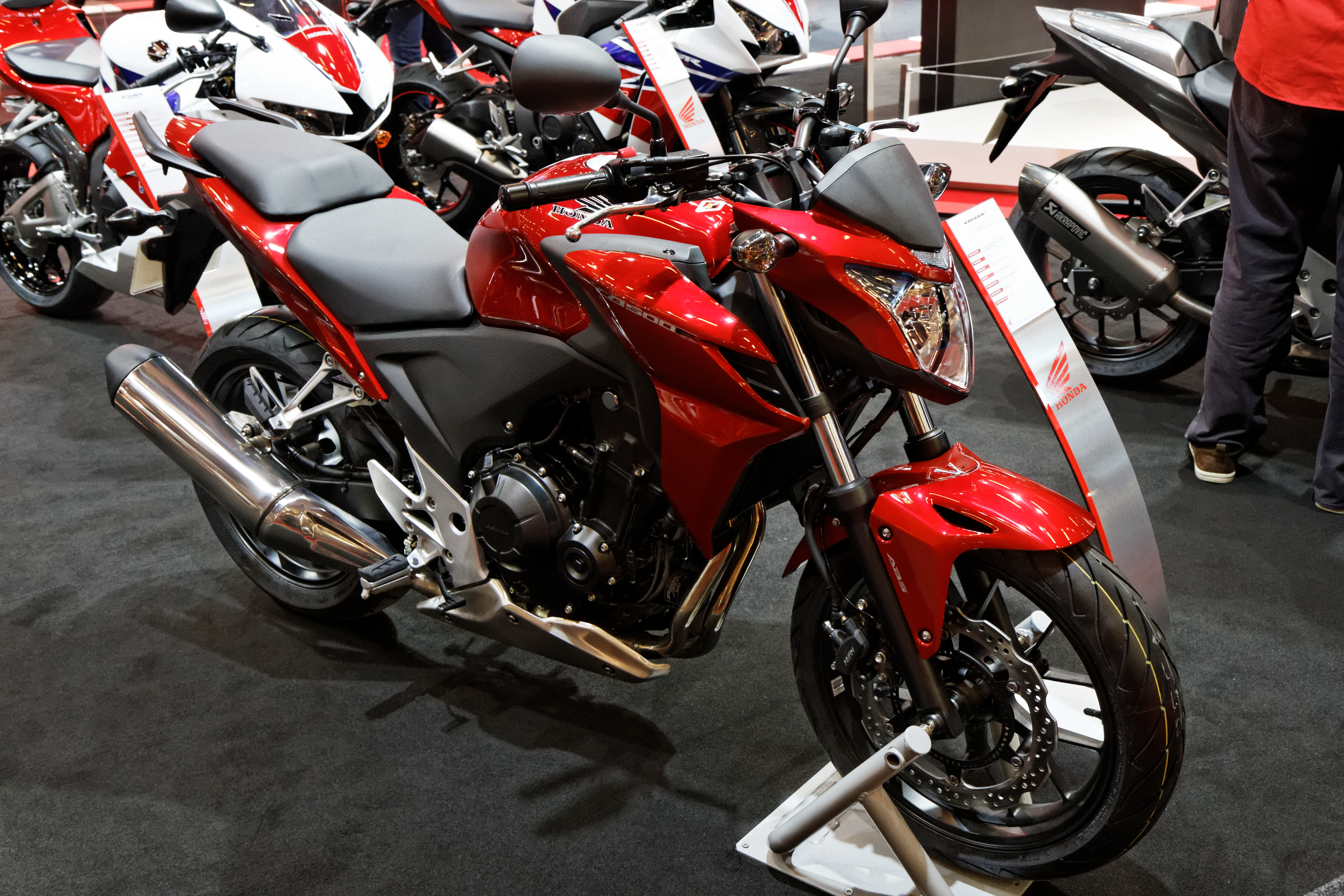 Une Honda CBR présentée lors du salon de la moto 2013.